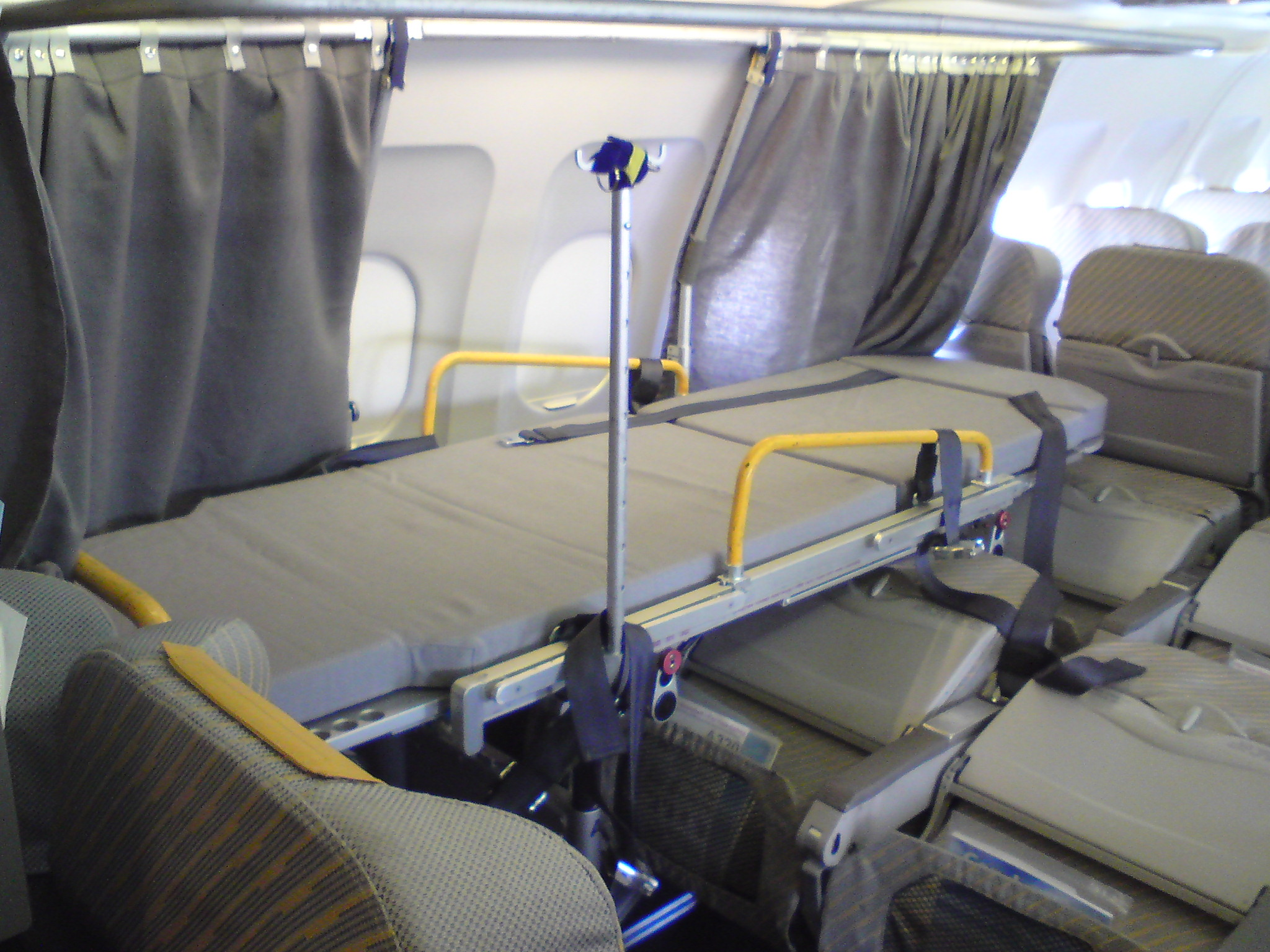 Ein sogenannter Stretcher für den Krankentransport im Flugzeug.